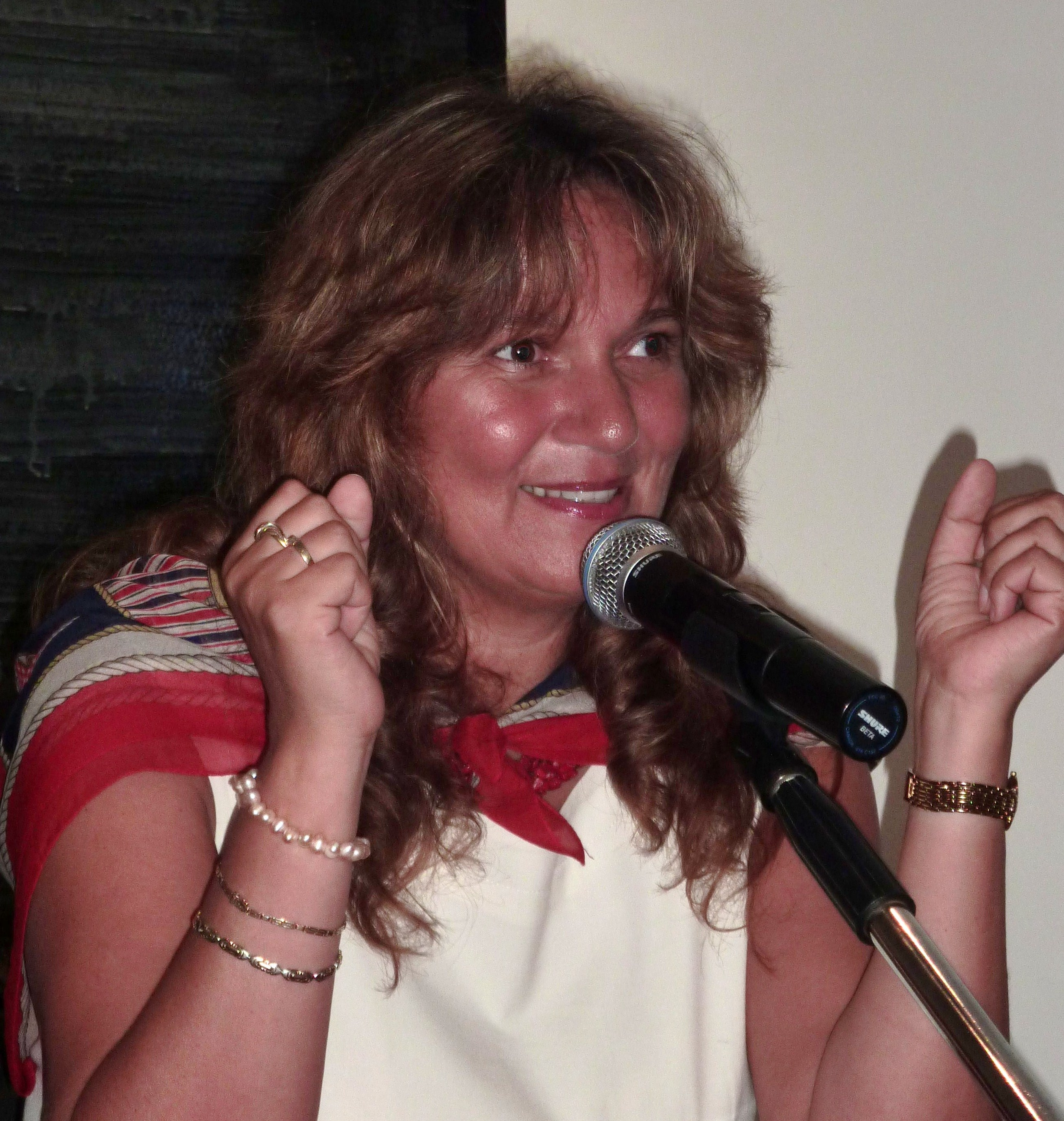 Betty Batoul lors d'une conférence à la Villa des Arts, Casablanca